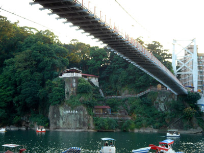 碧潭是台北縣新店市境內的一處風景名勝，境內以圖中所見的碧潭吊橋及孫科題字的大石壁聞名，是台北居民週末閒暇時非常熱門的休閒去處之一。本圖片是由上傳者User:SElephant本人於2005年5月拍攝。